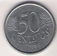 Frente da moeda de 50 centavos da primeira geração. Cunhada em 1994. This graphic was created with GIMP.